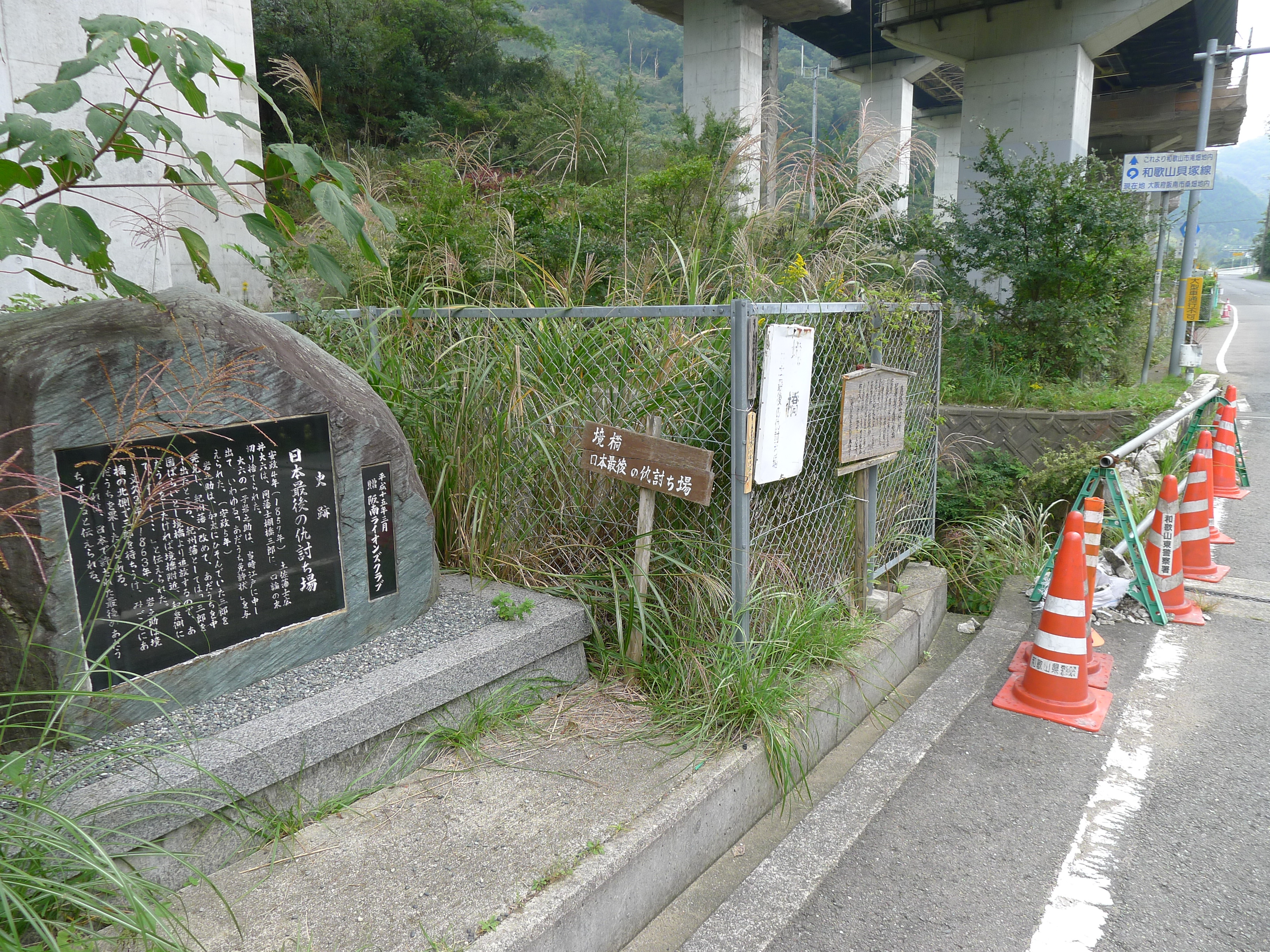 和泉国と紀伊国の国境となる境橋